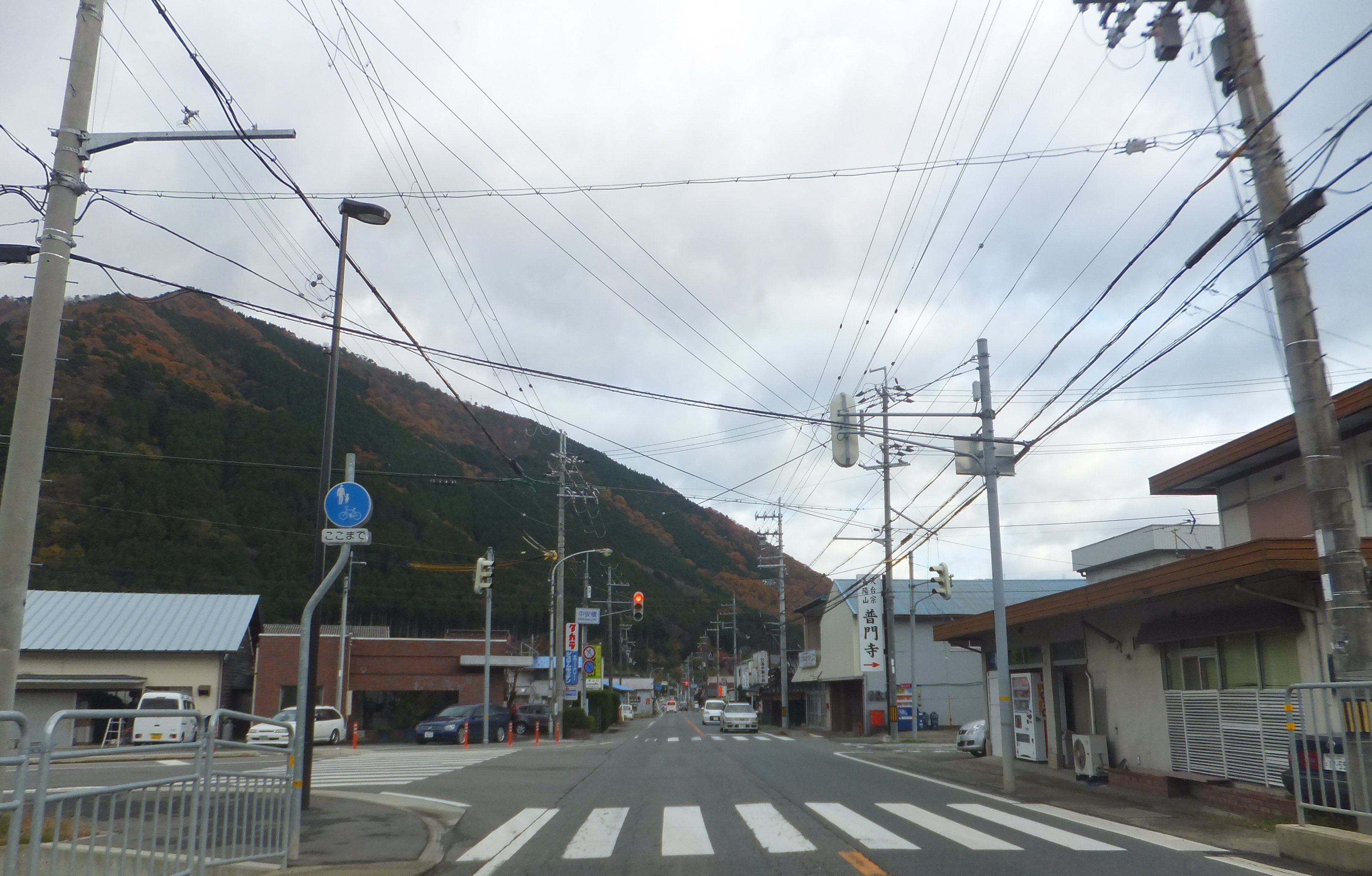 兵庫県宍粟市一宮町安積 国道29号